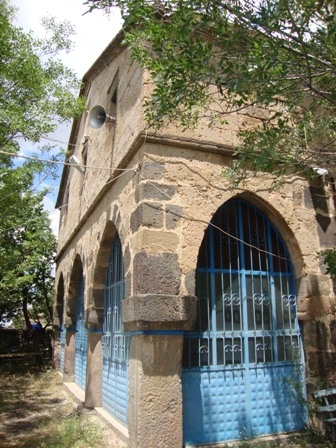 Eskiden Kilise olarak kullanılan ve günümüzde Yeni Cami adıyla yöre halkının kullandığı Tarihi Camii